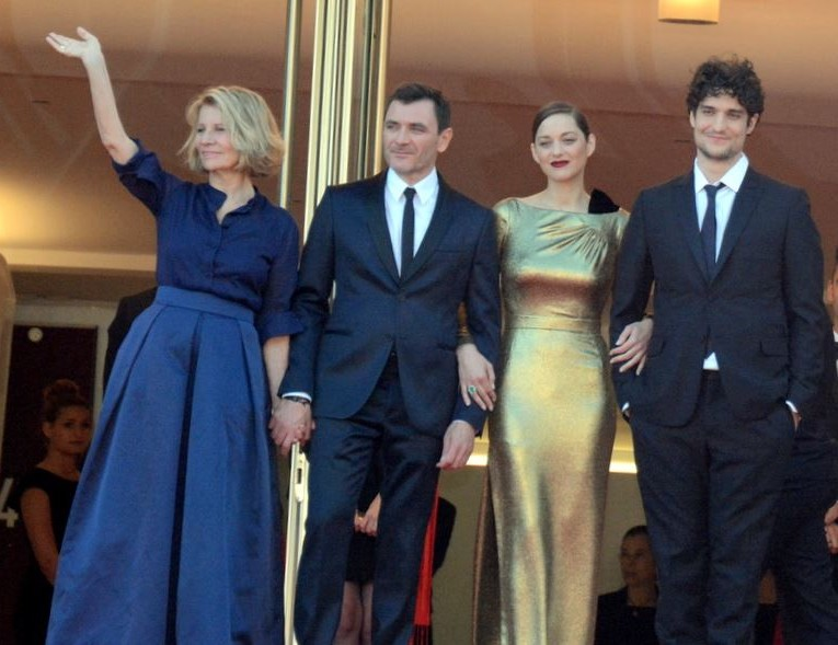 Présentation du film "Mal de pierres" au festival de Cannes. De gauche à droite, Nicole Garcia, Àlex Brendemühl, Marion Cotillard, Louis Garrel.